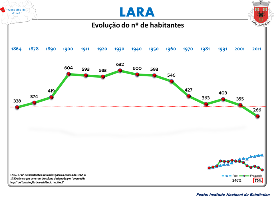 Censos 1864/2011